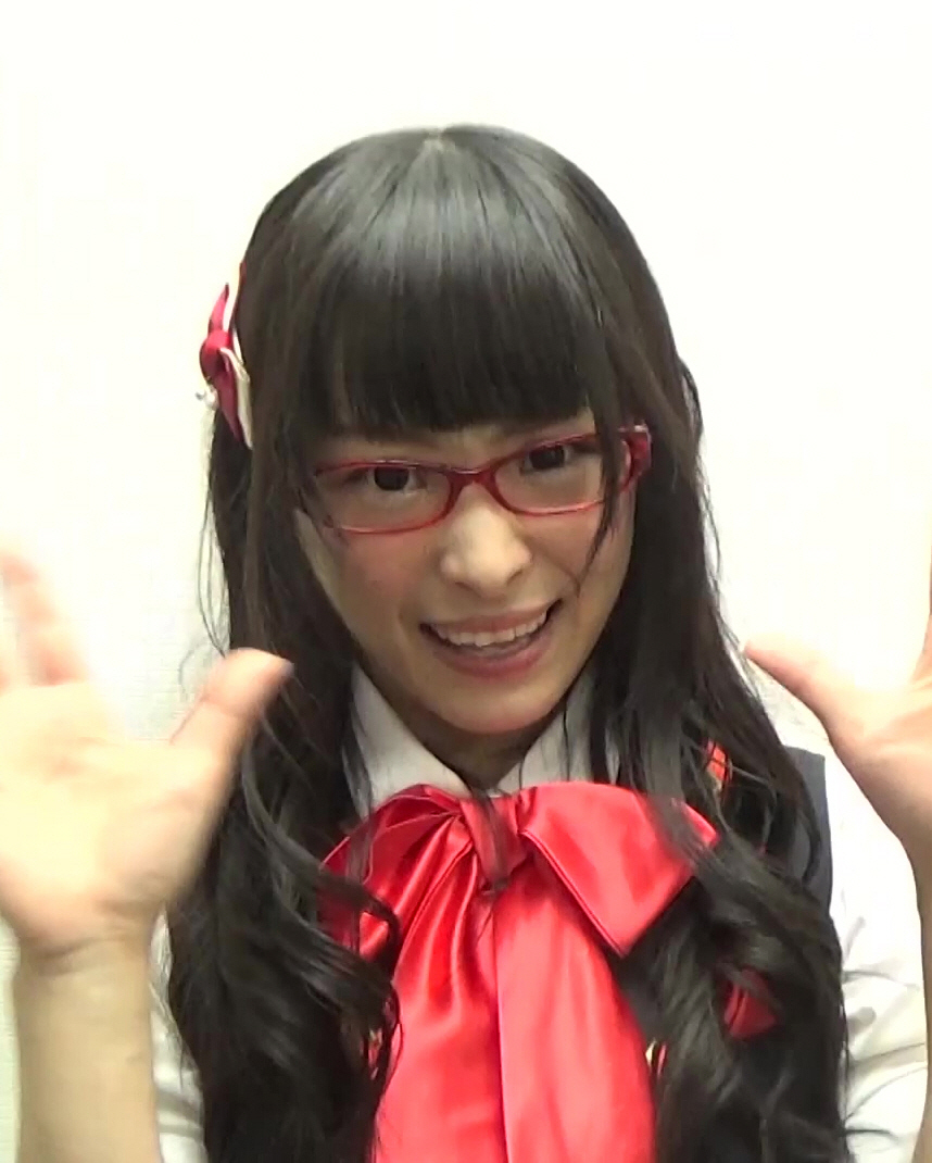 SIR『山下若菜』（わっちゃん）自己紹介